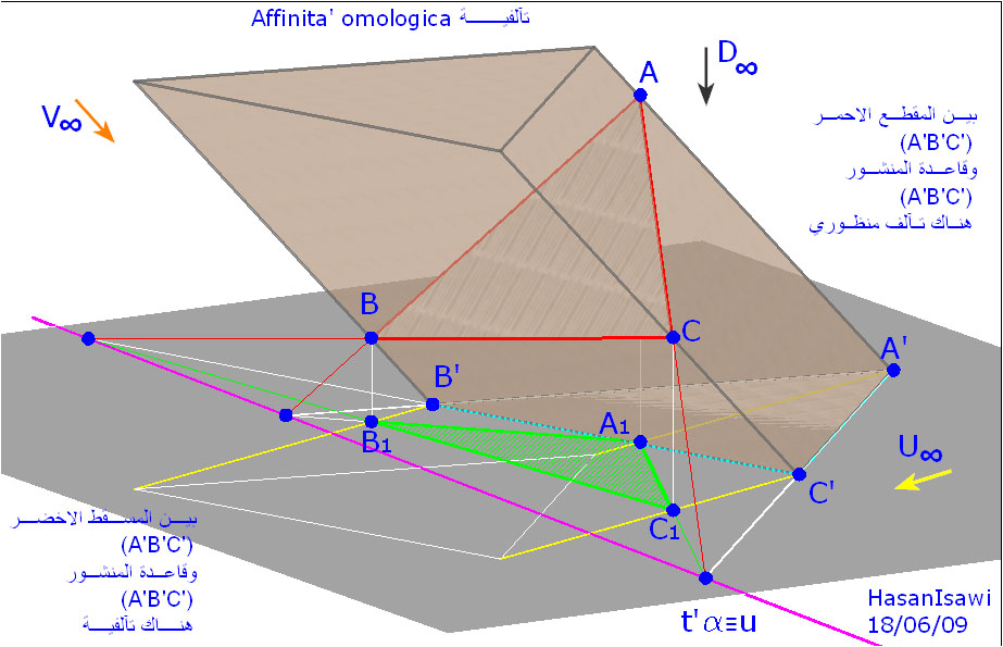 descriptive geometry تصنيف:هندسة وصفية